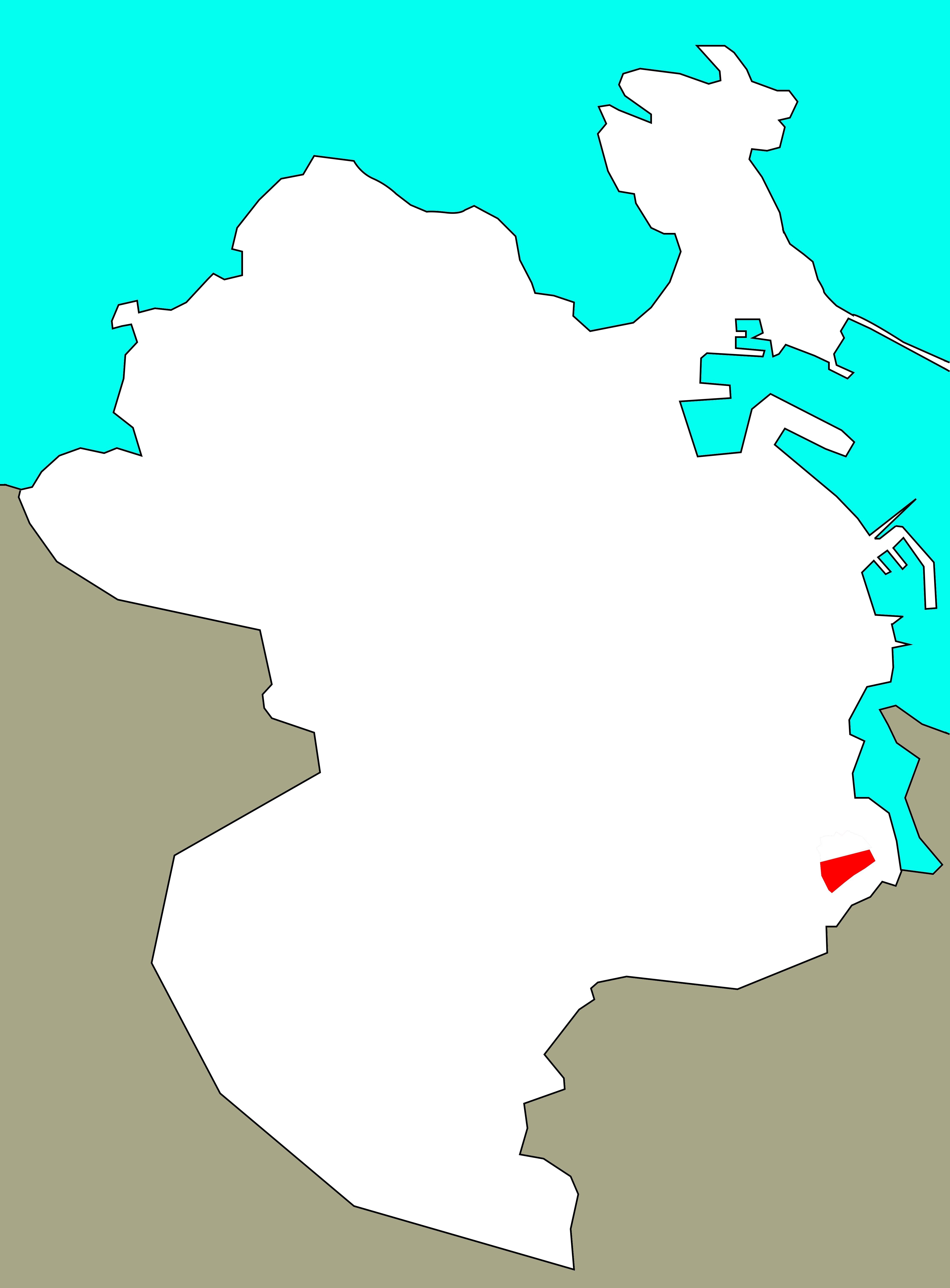 Situación de Santa Xema no concello da Coruña, segundo